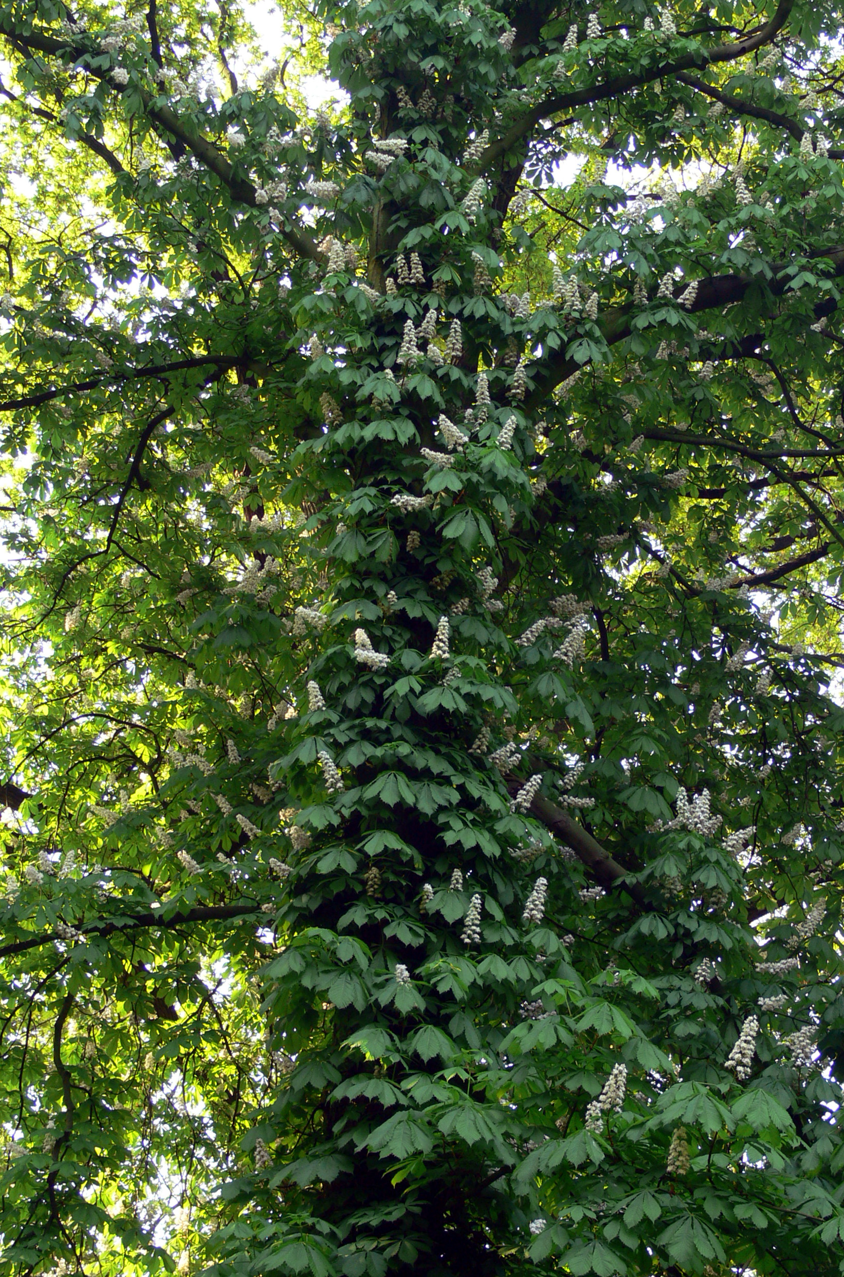 rameaux (gourmands), feuilles et fleurs épicormiques poussant sur le tronc d'un marronnier, sur sa face exposée à la lumière, après la coupe de grosses branches poussant au dessus d'une allée